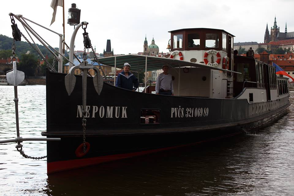 Loď Nepomuk